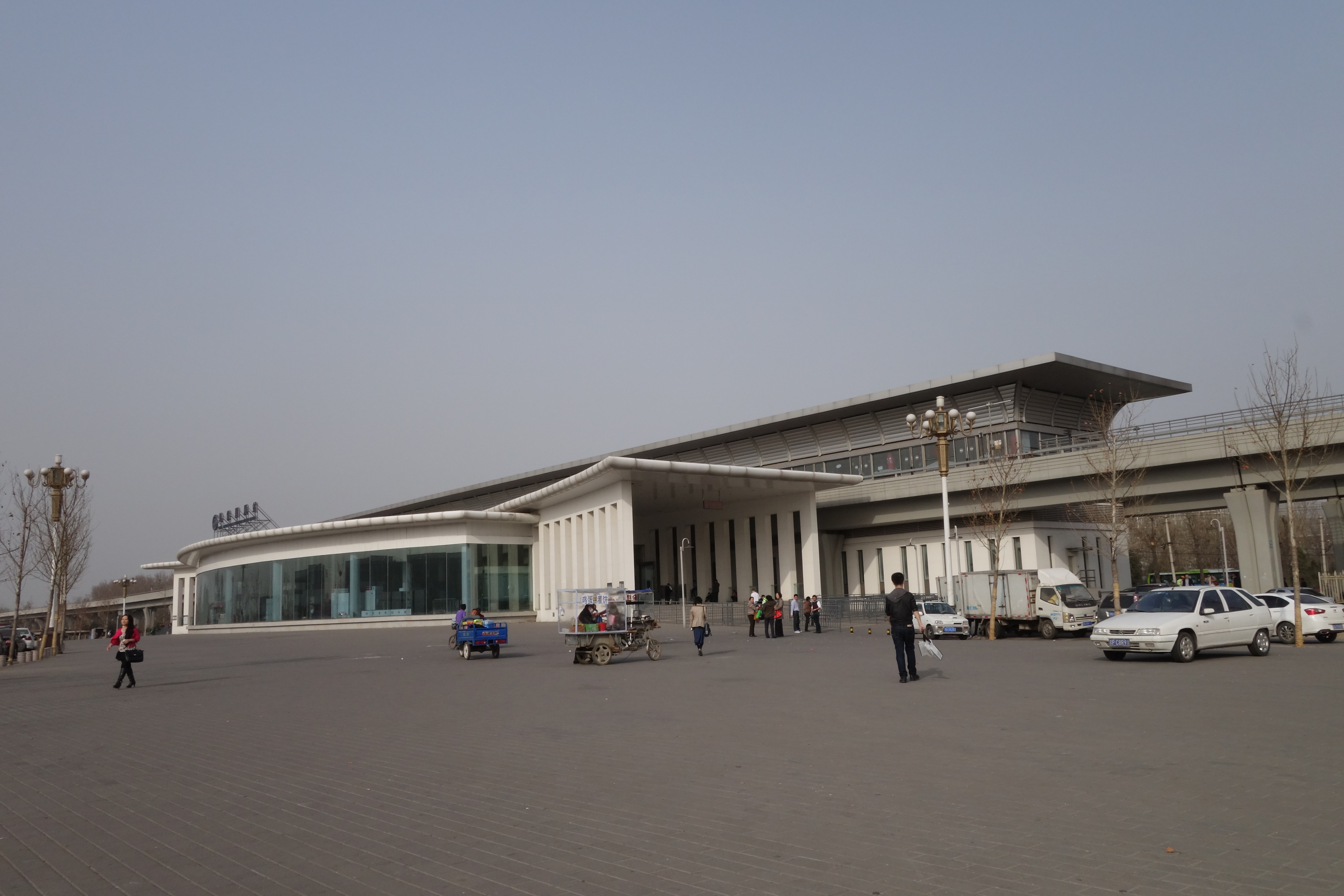 国展站前广场